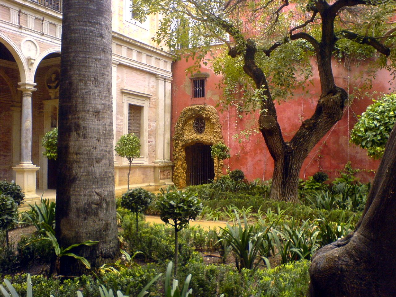 Jardín Grande de la Casa de Pilatos (Sevilla, Andalucía, España)